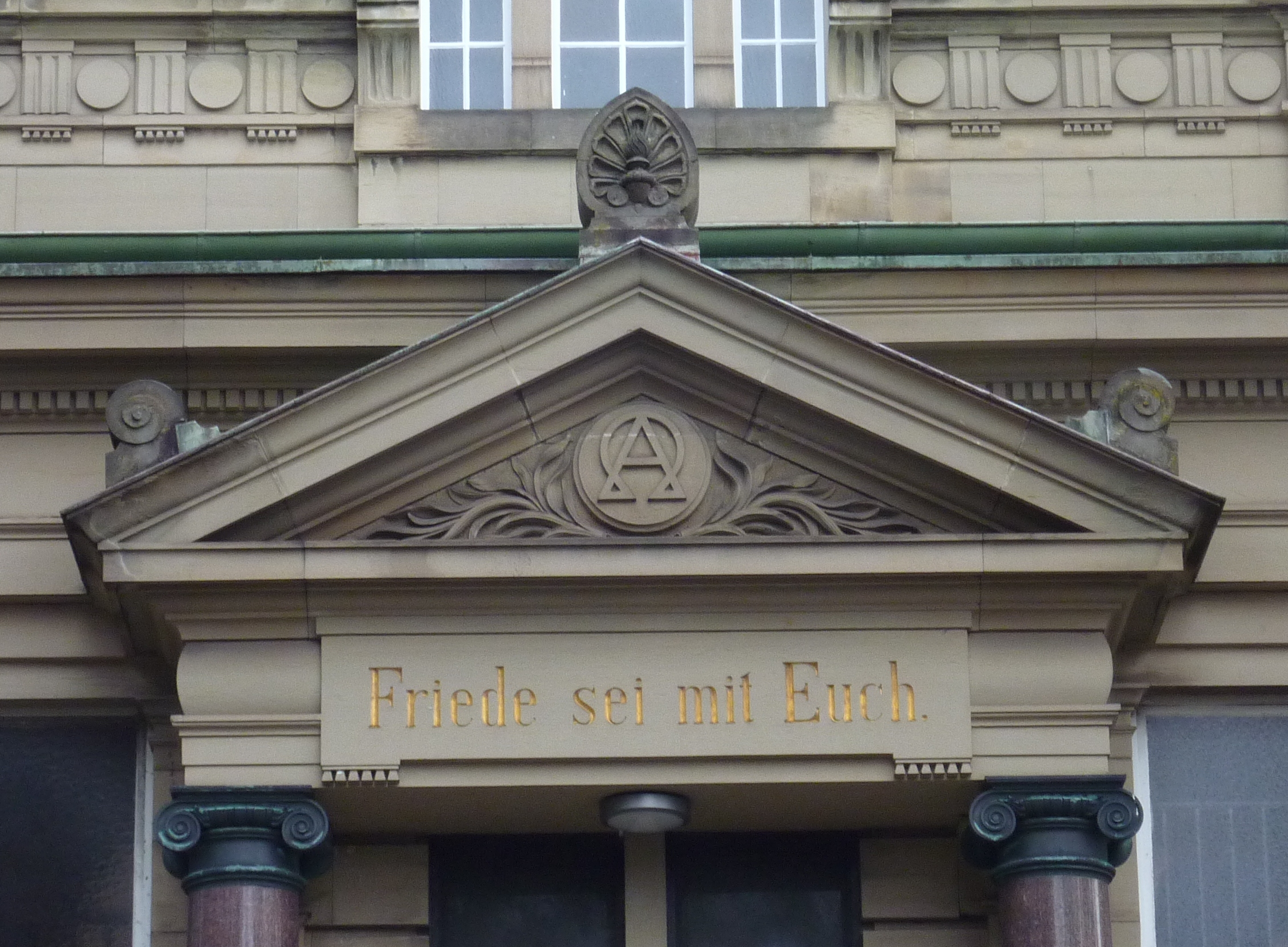 Detail der Aussegnungshalle auf dem Ebershaldenfriedhof